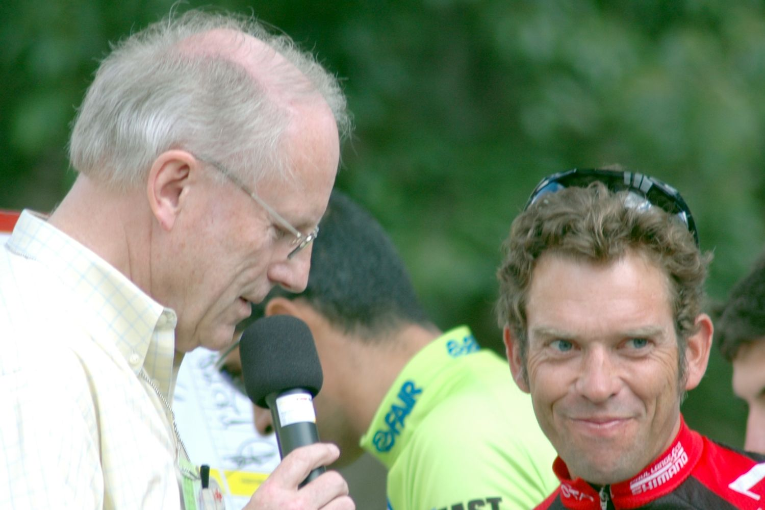 Beschreibung: Radprofi Holger Sievers (Team Lamonta) im Gespräch mit Moderator Herbert Watterott (links) vor dem Start der ersten Etappe der Rothaus Regio-Tour 2006 von Heitersheim nach Guebwiller. Quelle: Fotografiert am 16. August 2006 in Heitersheim Fotograf oder Zeichner: Alex Kamera: Nikon D 70 Software: The GIMP Andere Versionen: Lizenzstatus: GNU FDL